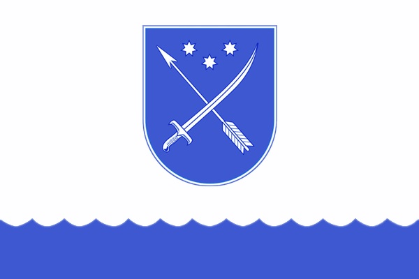 Прапор м. Дніпропетровська, затверджений 5.12.2012